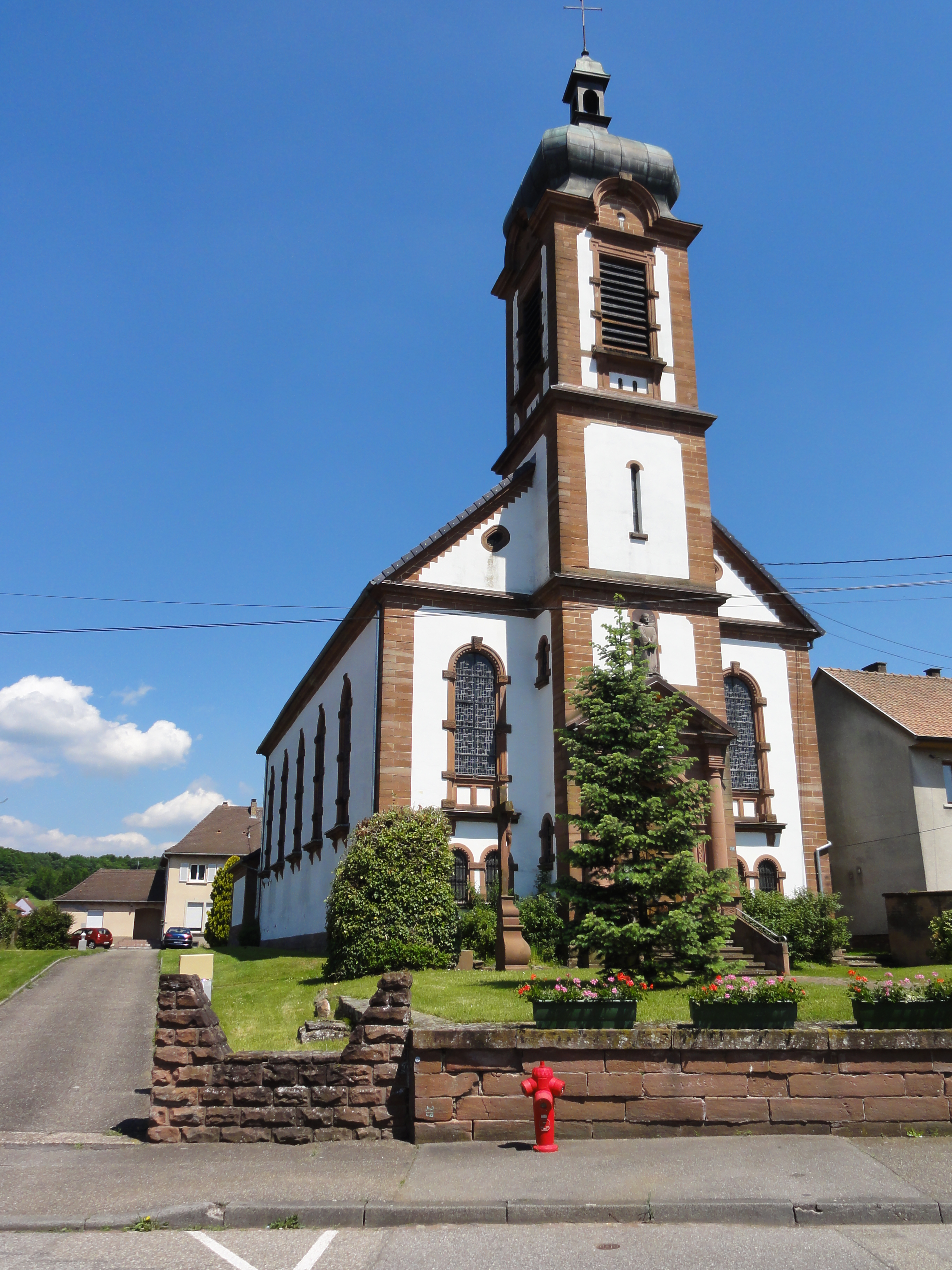 Alsace, Bas-Rhin, Gumbrechtshoffen, Église Saint-Barthélemy (1905).